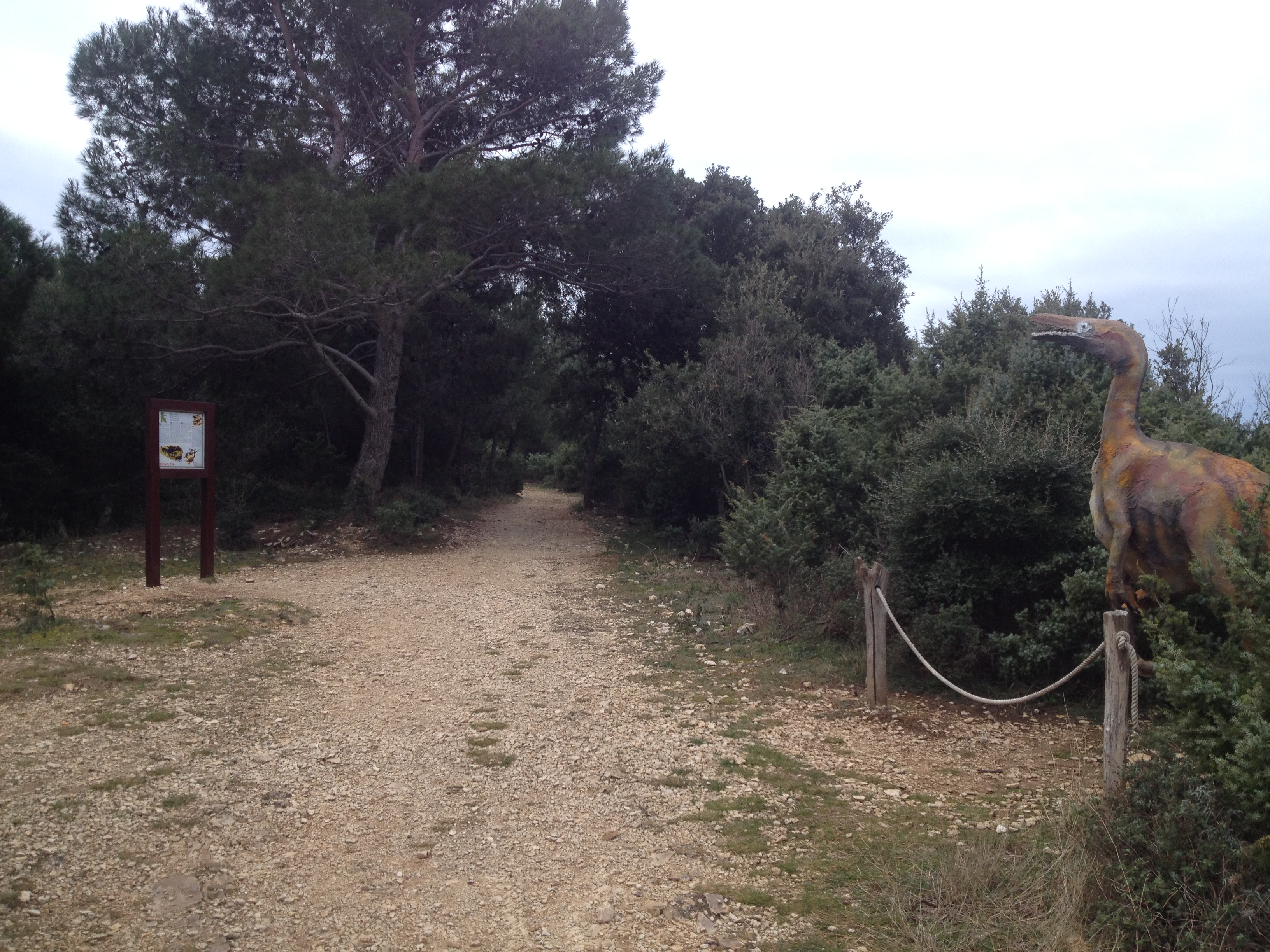 Kamenjak dinosaur